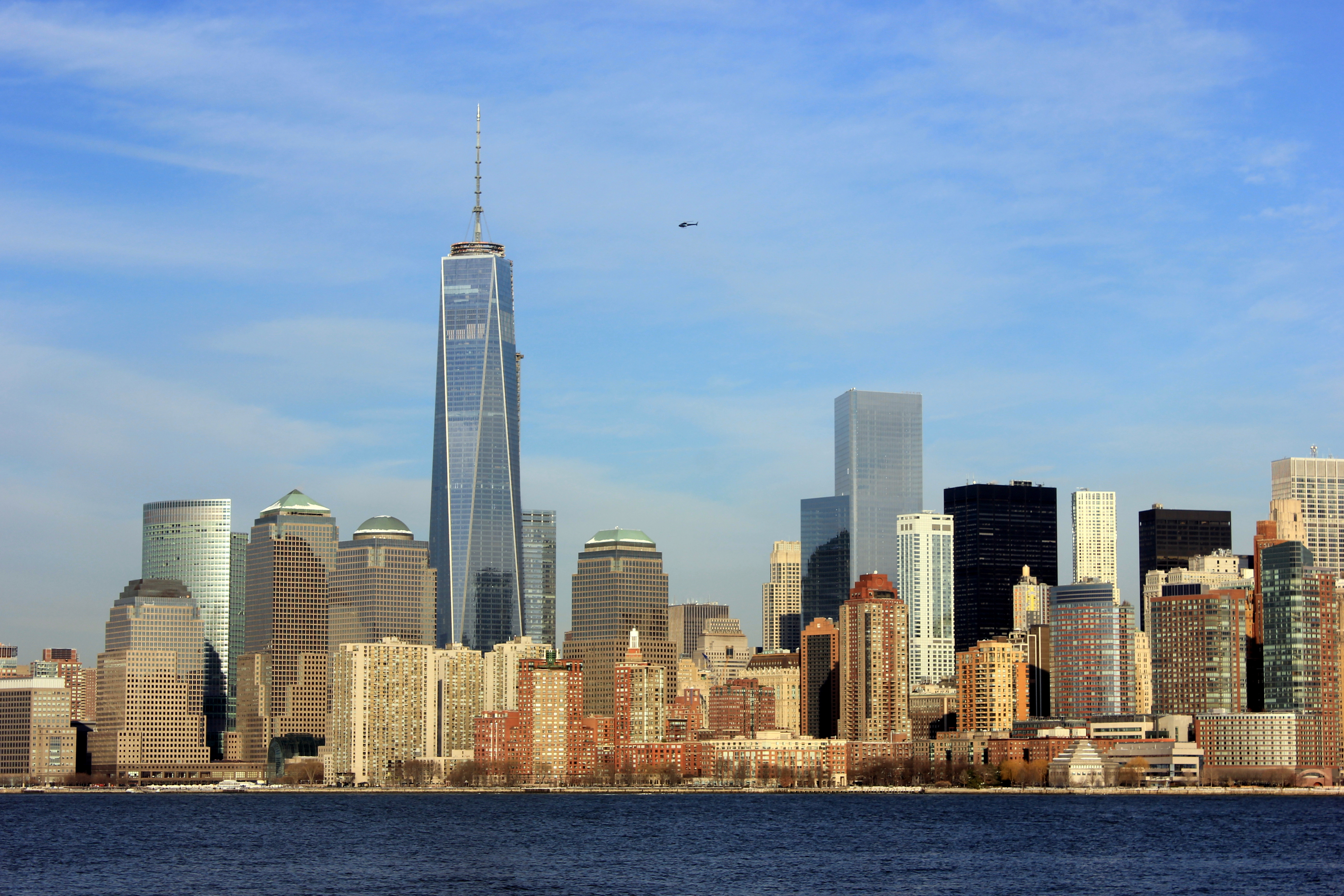 Manhattan Skyline